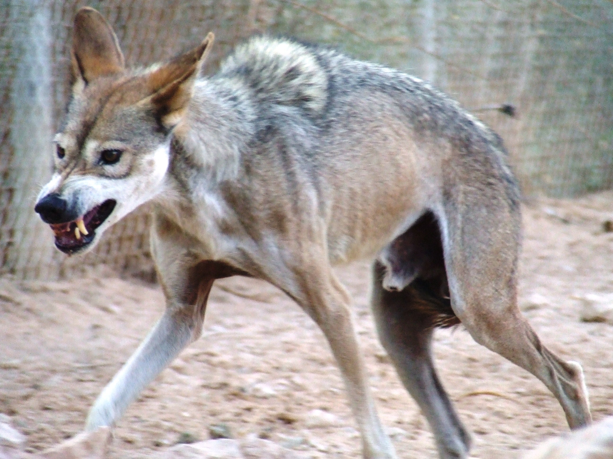 זאב מצוי מסמר את רעמתו